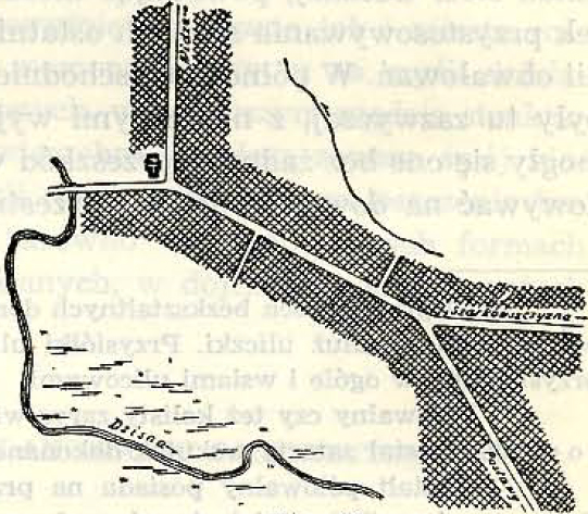 Беларуская (тарашкевіца): Казяны (Kaziany)